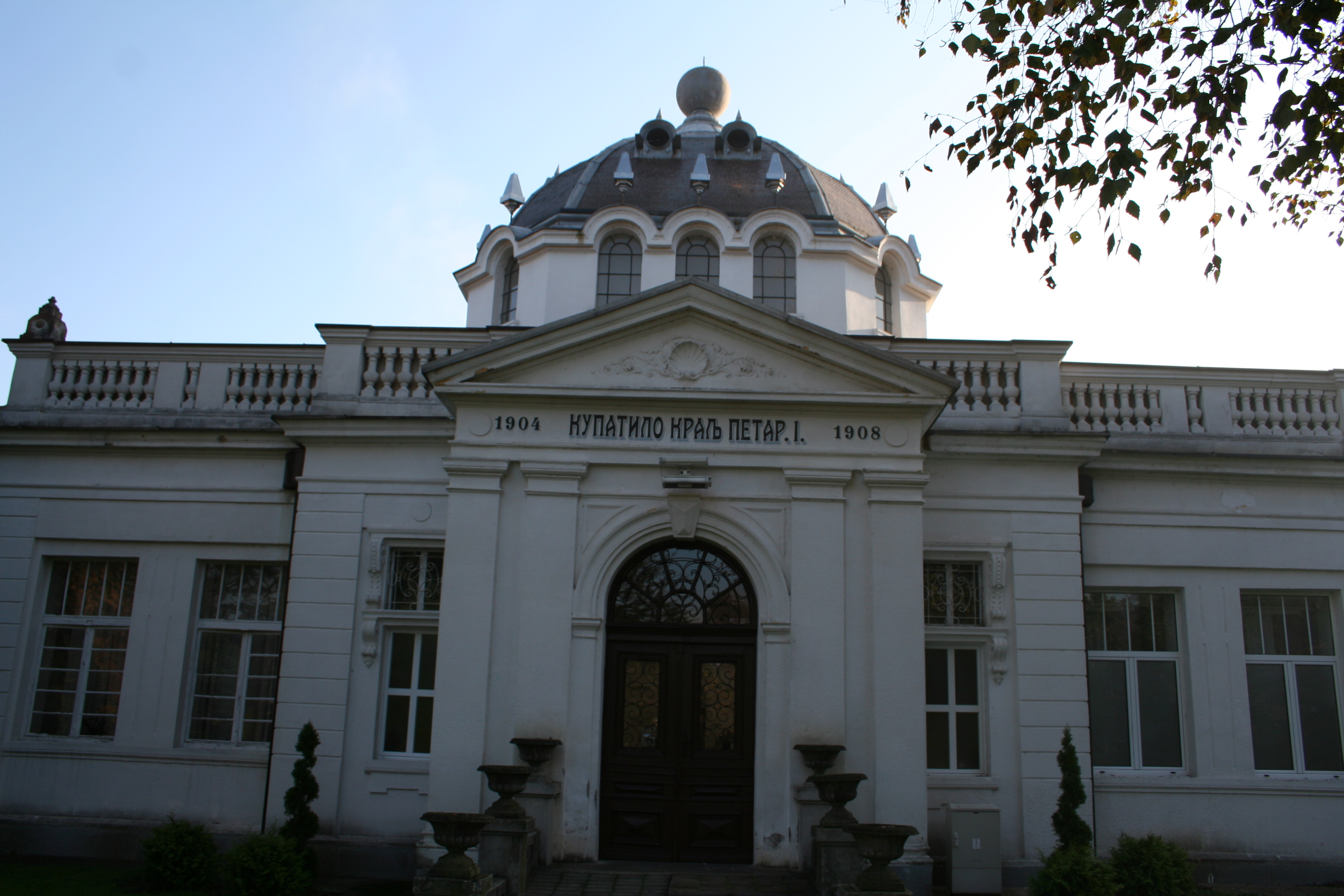 Specijalna bolnica za rehabilitaciju Banja Koviljača